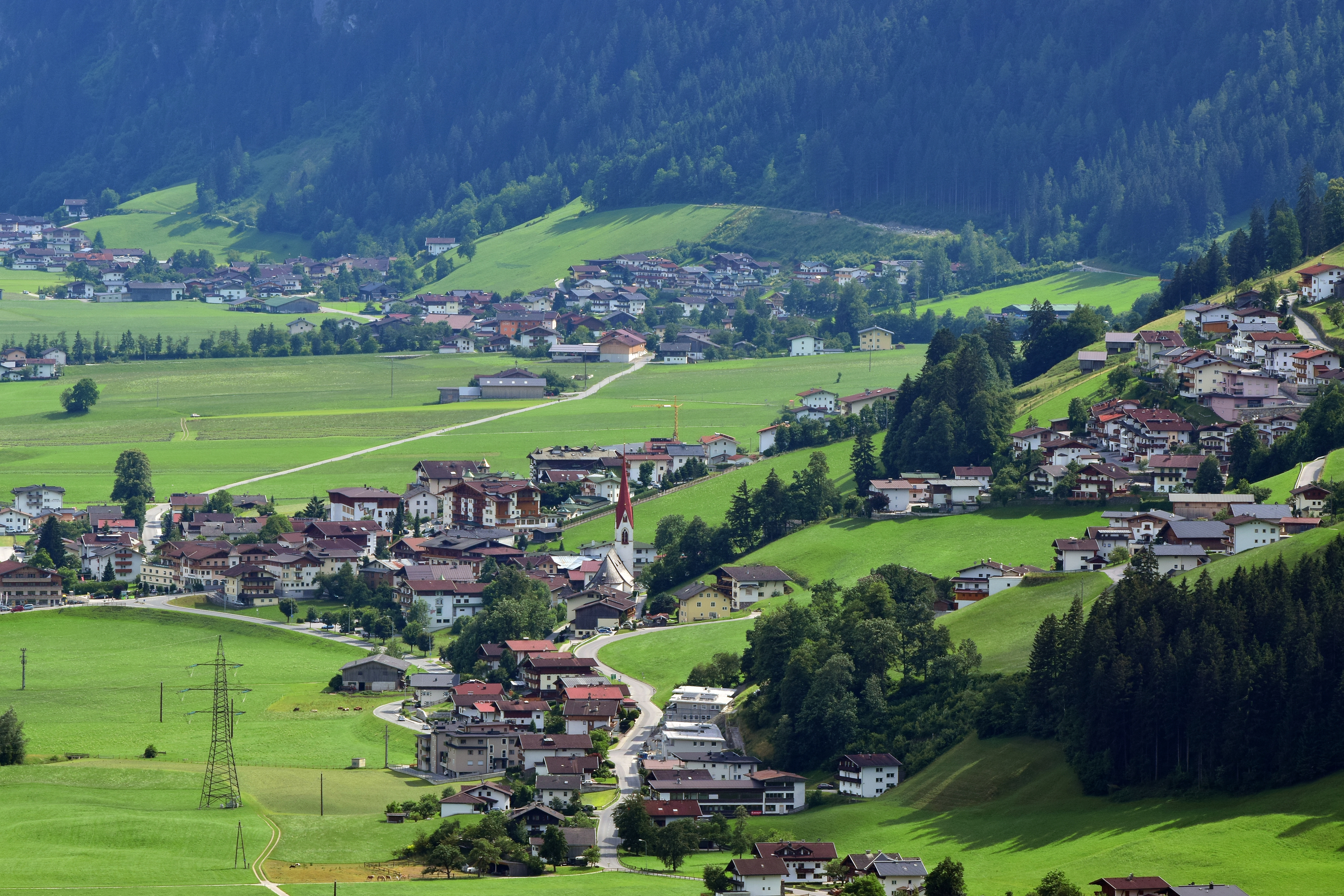 Ortsansicht von Hippach-Dorf, dahinter die Gemeinde Schwendau (gesehen aus Zellberg)